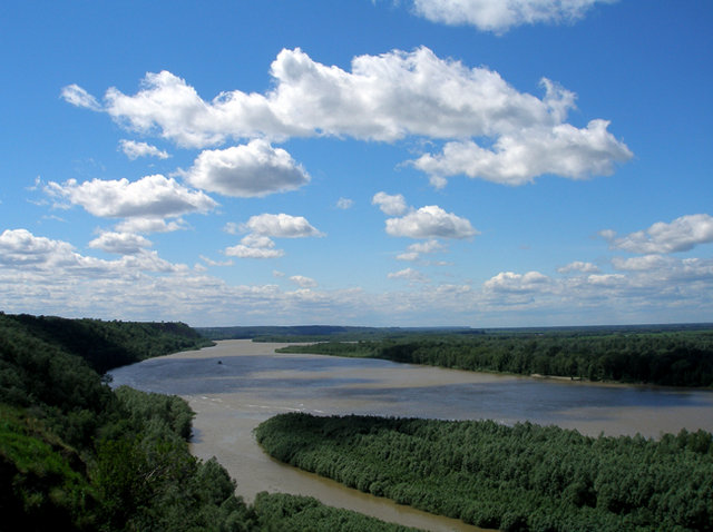 Долина Оби Научный городок